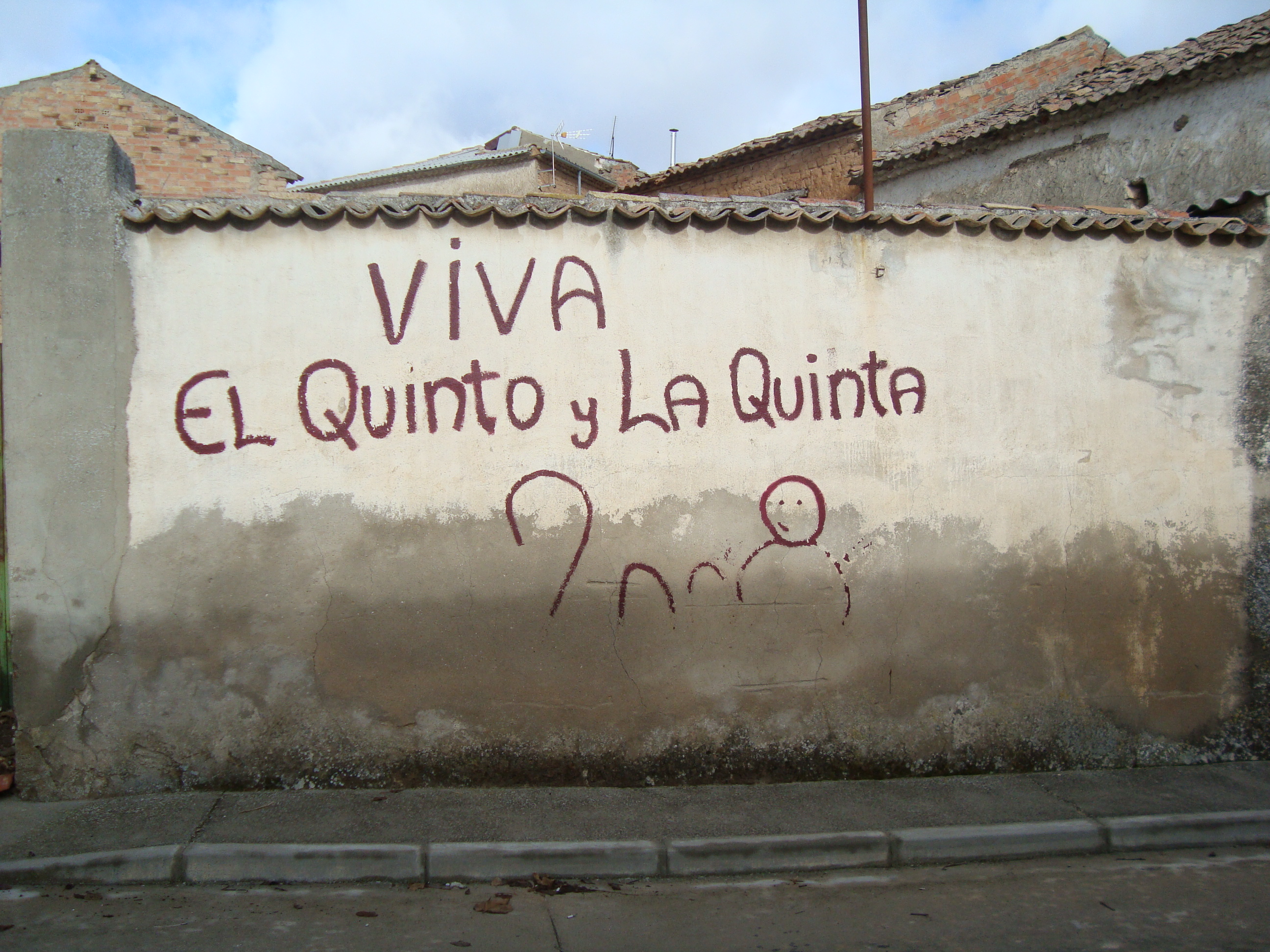 Tapia de edificación en el casco urbano de Piñel de Arriba (Valladolid), con grafito de los quintos de 2008.